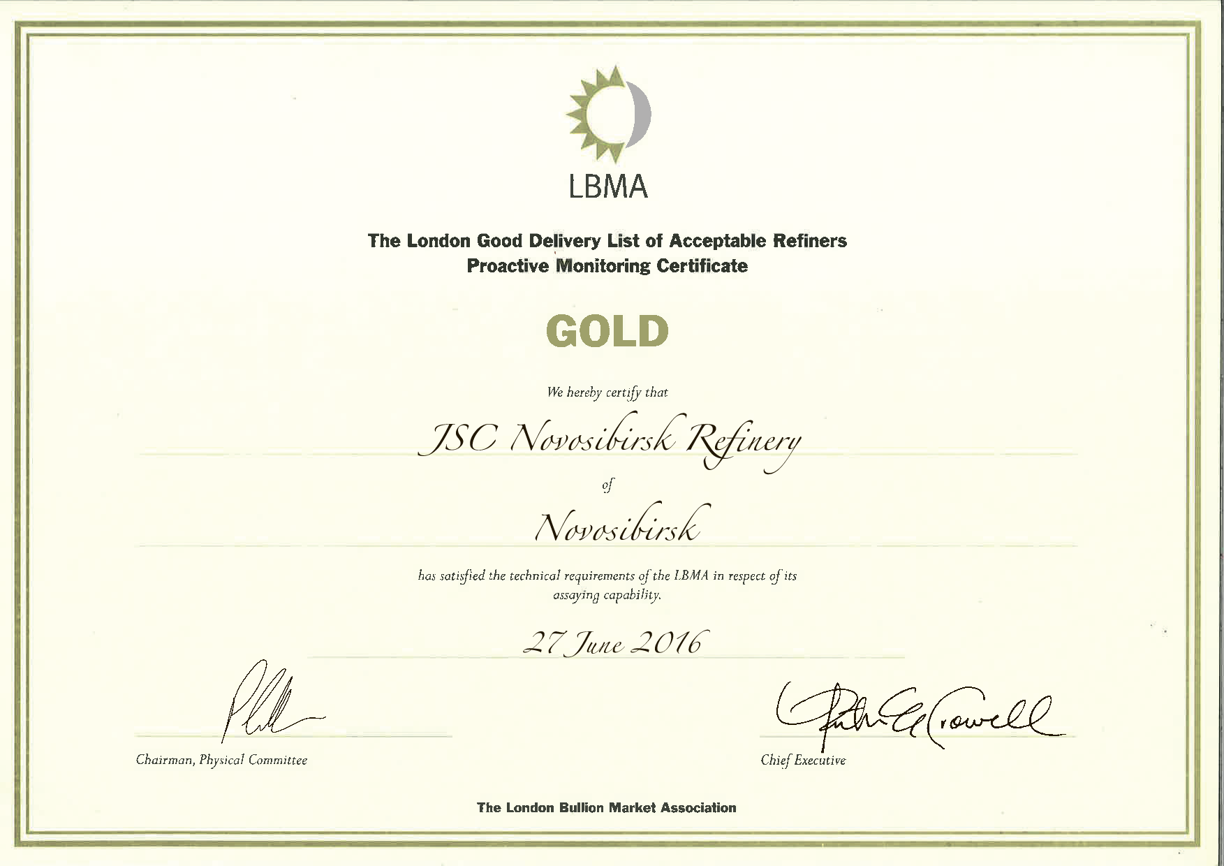 Скан сертификата LBMA от 2016 г., золото